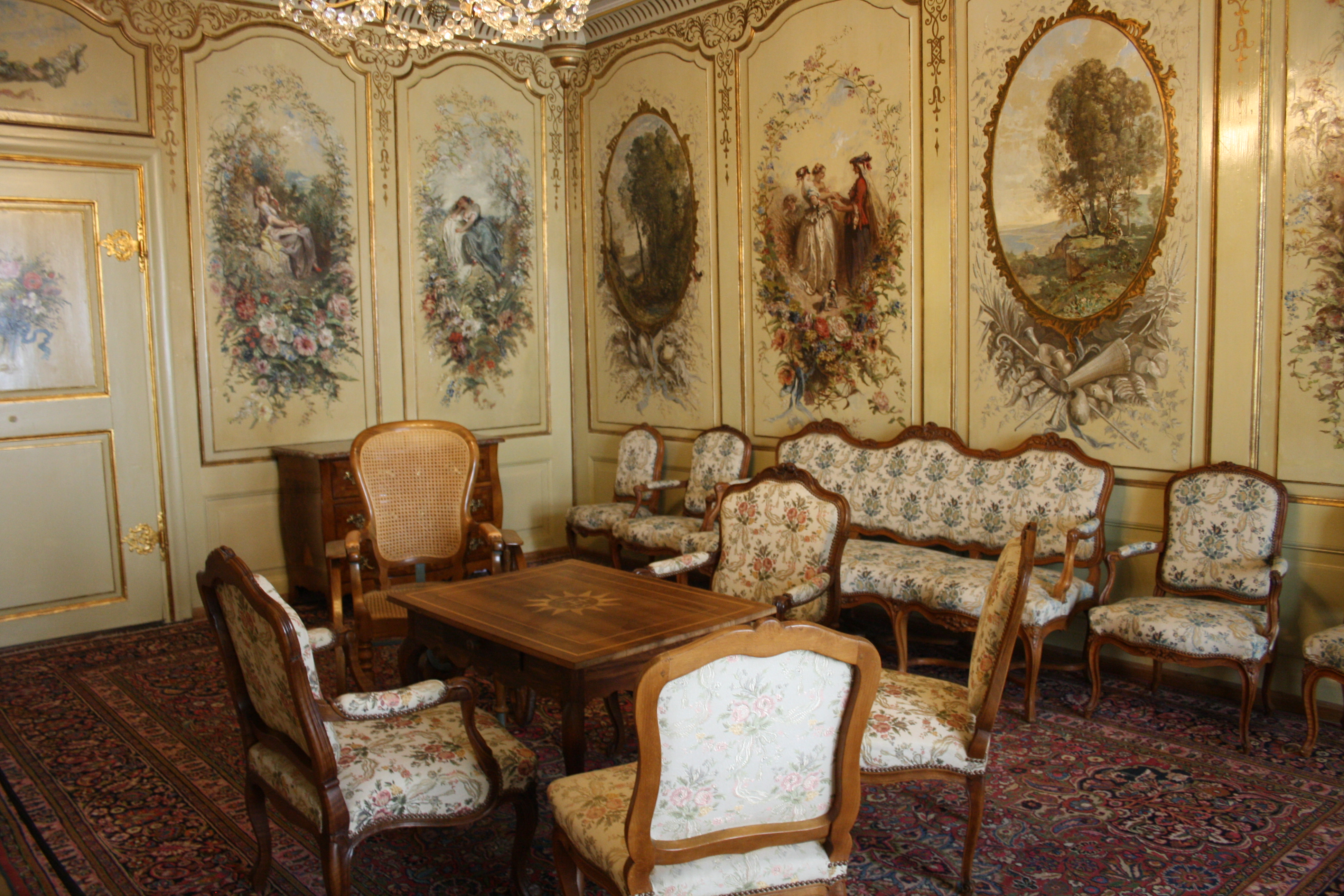 Salon Corot